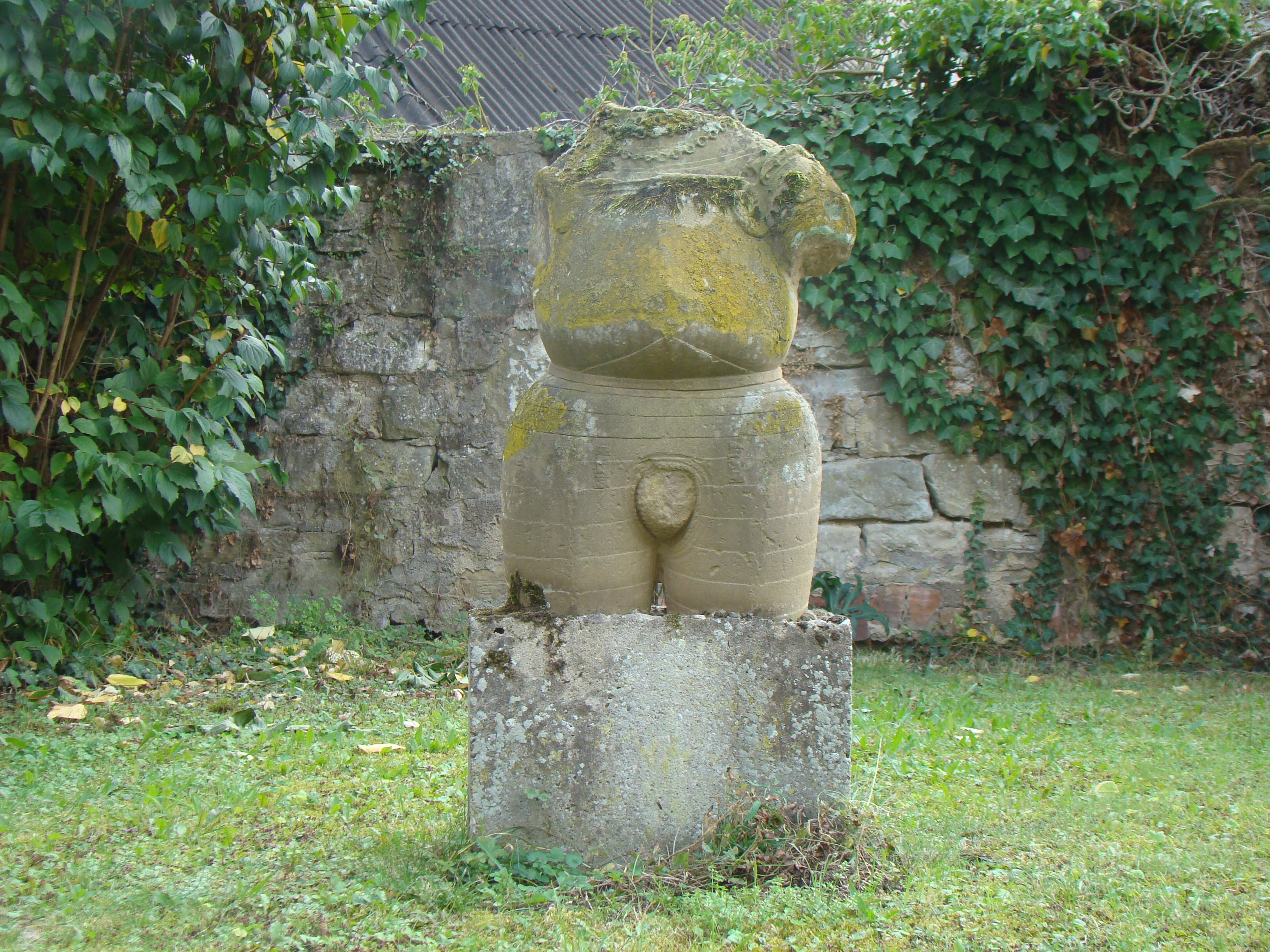 Schloss in Bad Rappenau-Fürfeld, Lapidarium im Vorhof